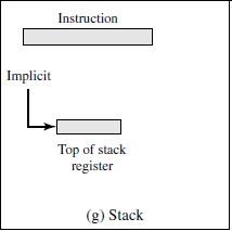 Adresimi me Stack